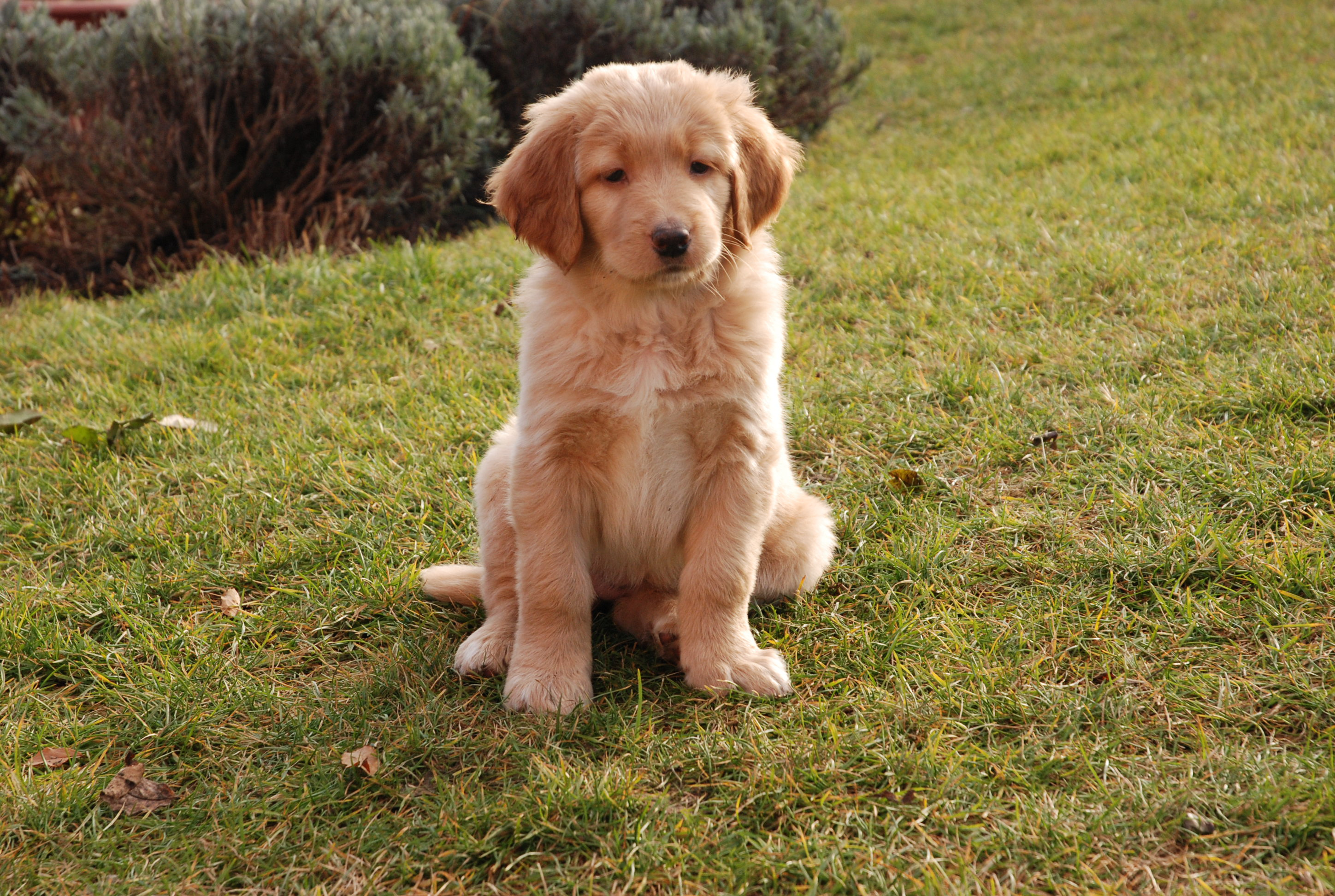 7 weeks old hovawart puppy